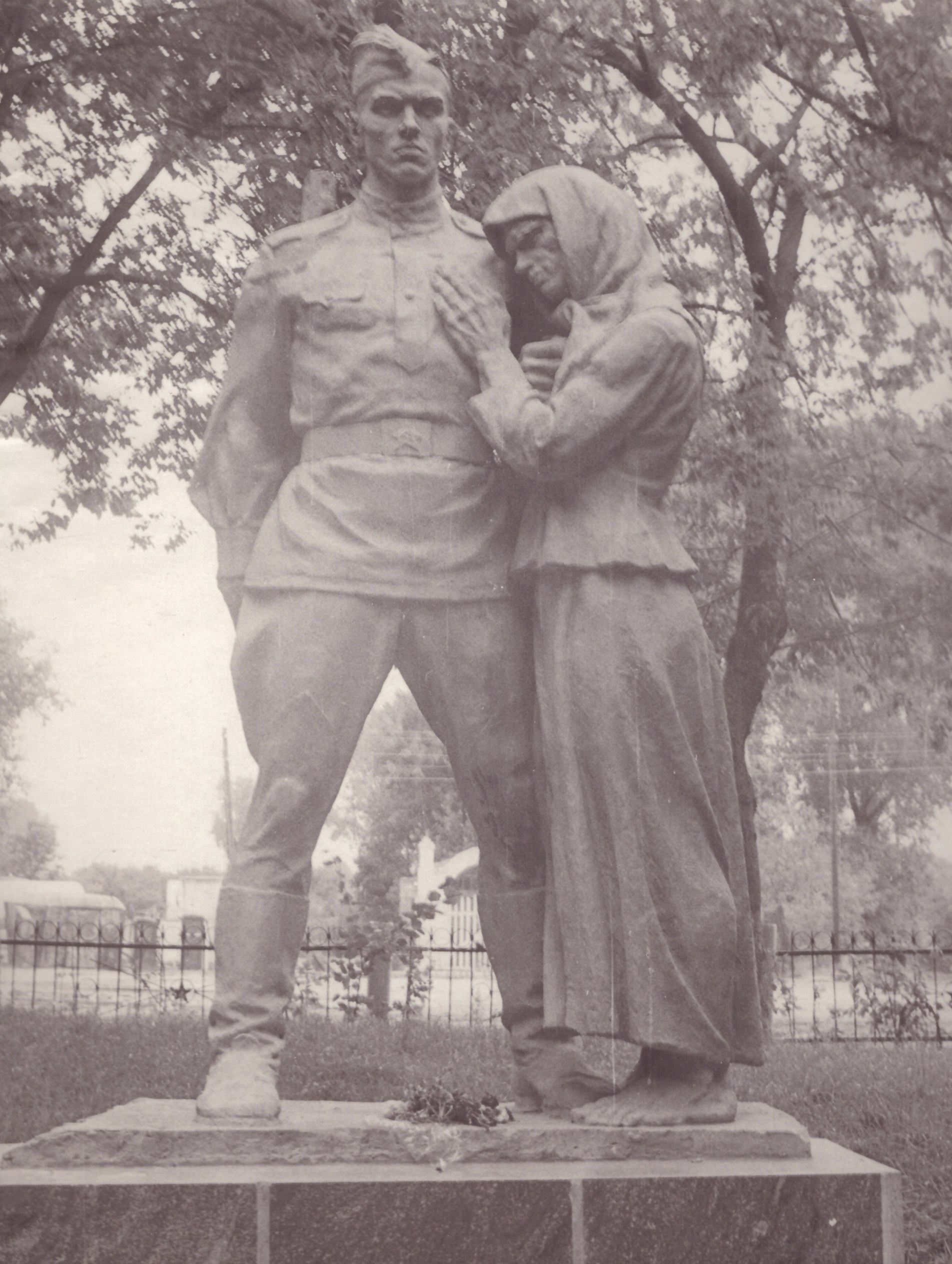 Пам’ятник загиблим воїнам-односельчанам в роки Великої Вітчизняної війни. С. Рея Бердичівський район Житомирська область. 1975. Скульптор Таранченко В.О., архітектор Марчук М.Г. Литий бетон.